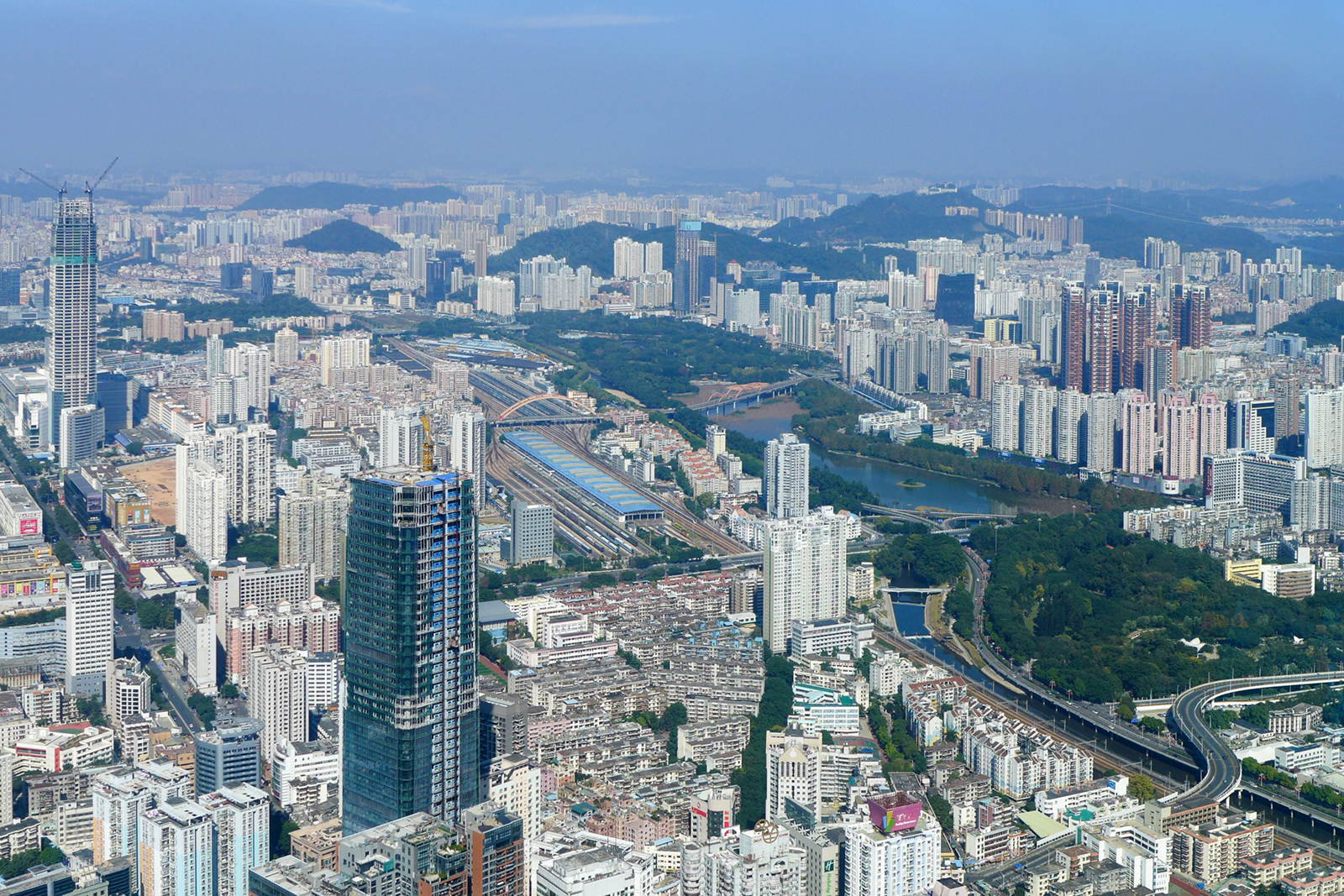 俯瞰洪湖公园及笋岗站一帶